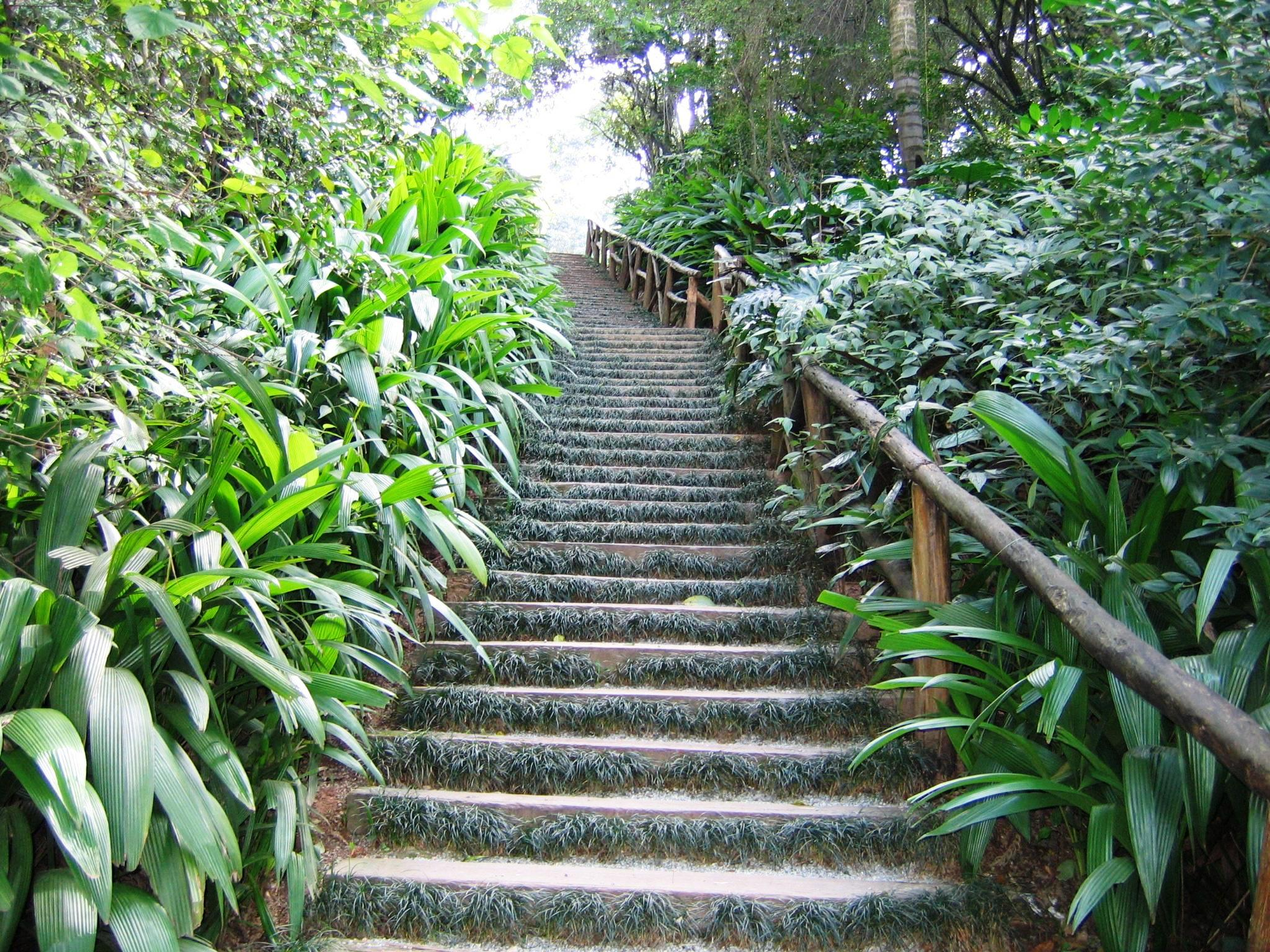 Escada rústica de terra e toras de madeira que une a parte superior do parque Parque Luís Carlos Prestescom a parte inferior